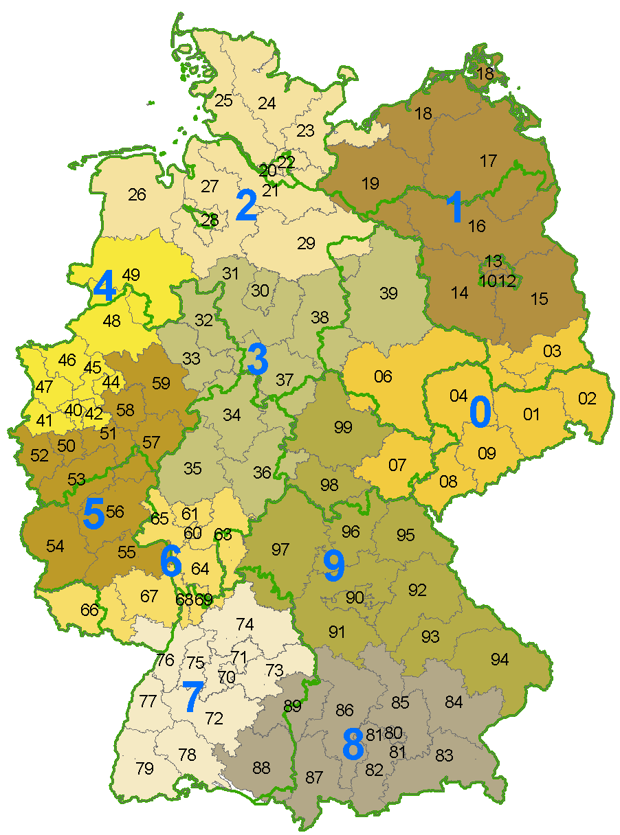 Karte der Postleitzahlen mit Zonen der ersten 2 Ziffern der PLZ und den Bundeslandgrenzen